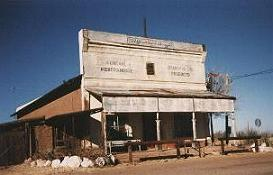 Pearce, Arizona